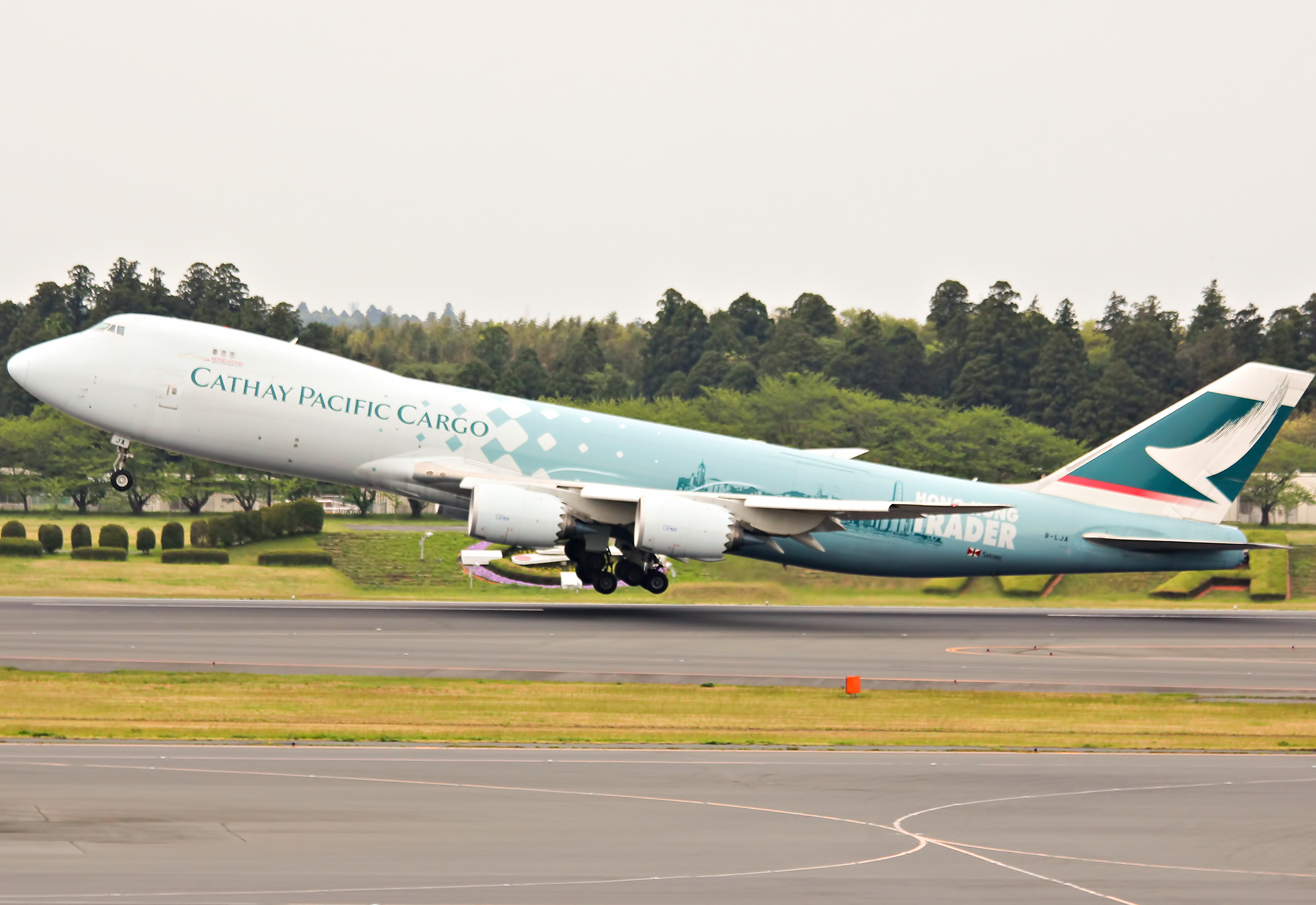 Boeing: 747-867F SN:39238/1427